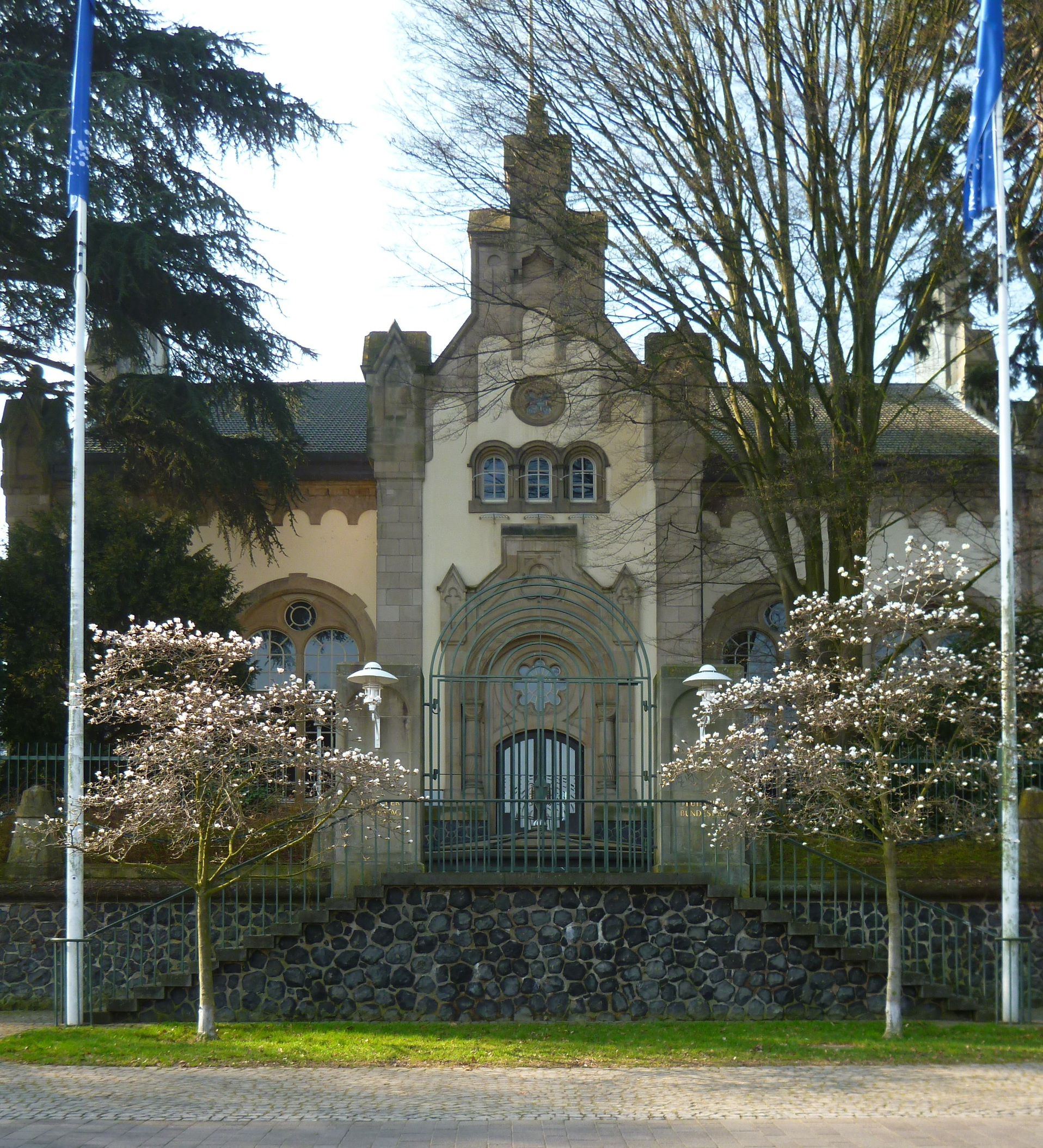 Altes Wasserwerk im Bundesviertel in Bonn